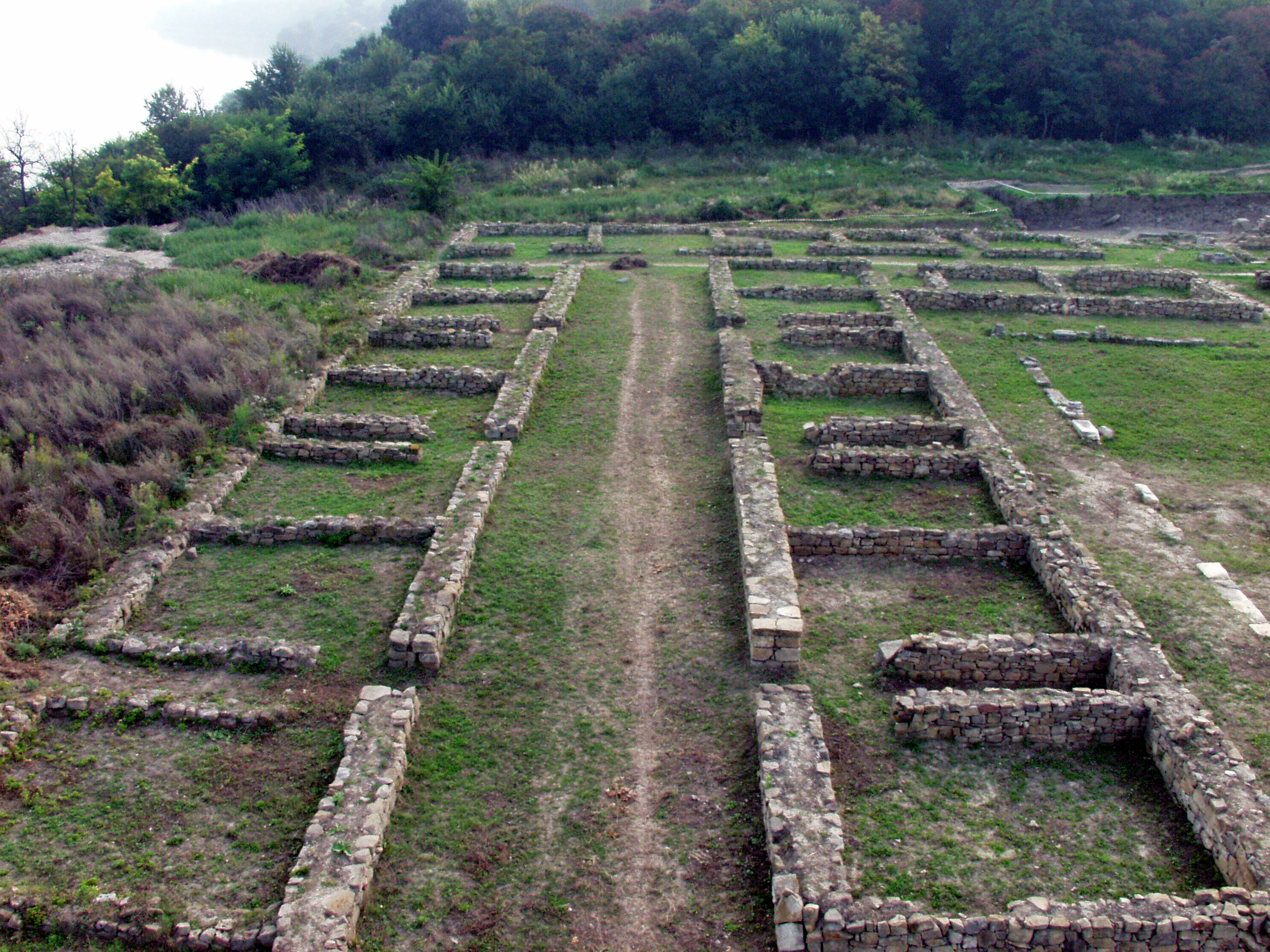 Novae, stanowisko archeologiczne w Bułgarii, ruiny rzymskiego szpitala wojskowego (valetudinarium)